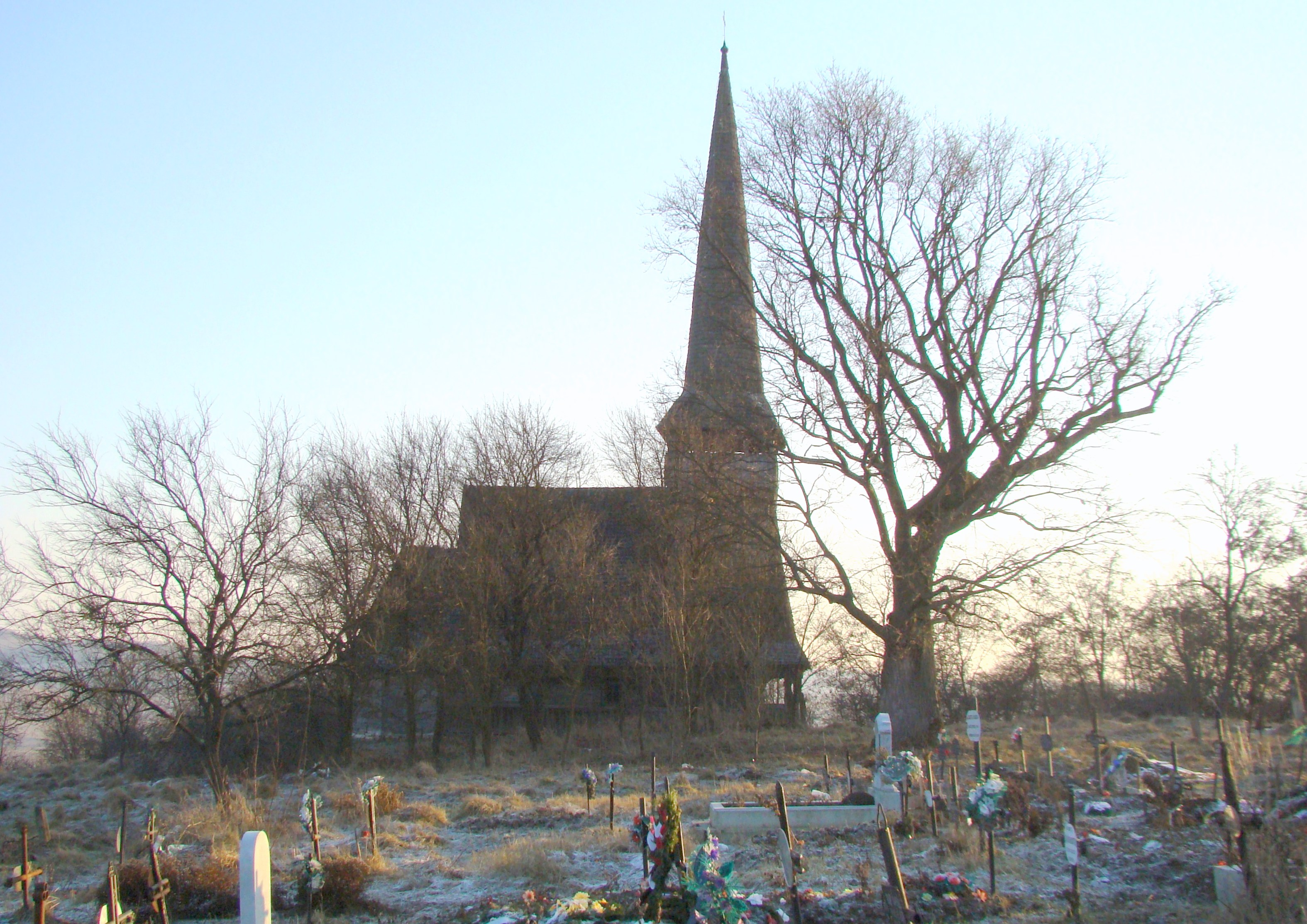 Biserica de lemn „Sf. Arhangheli” din Sânmihaiu Almașului, județul Sălaj